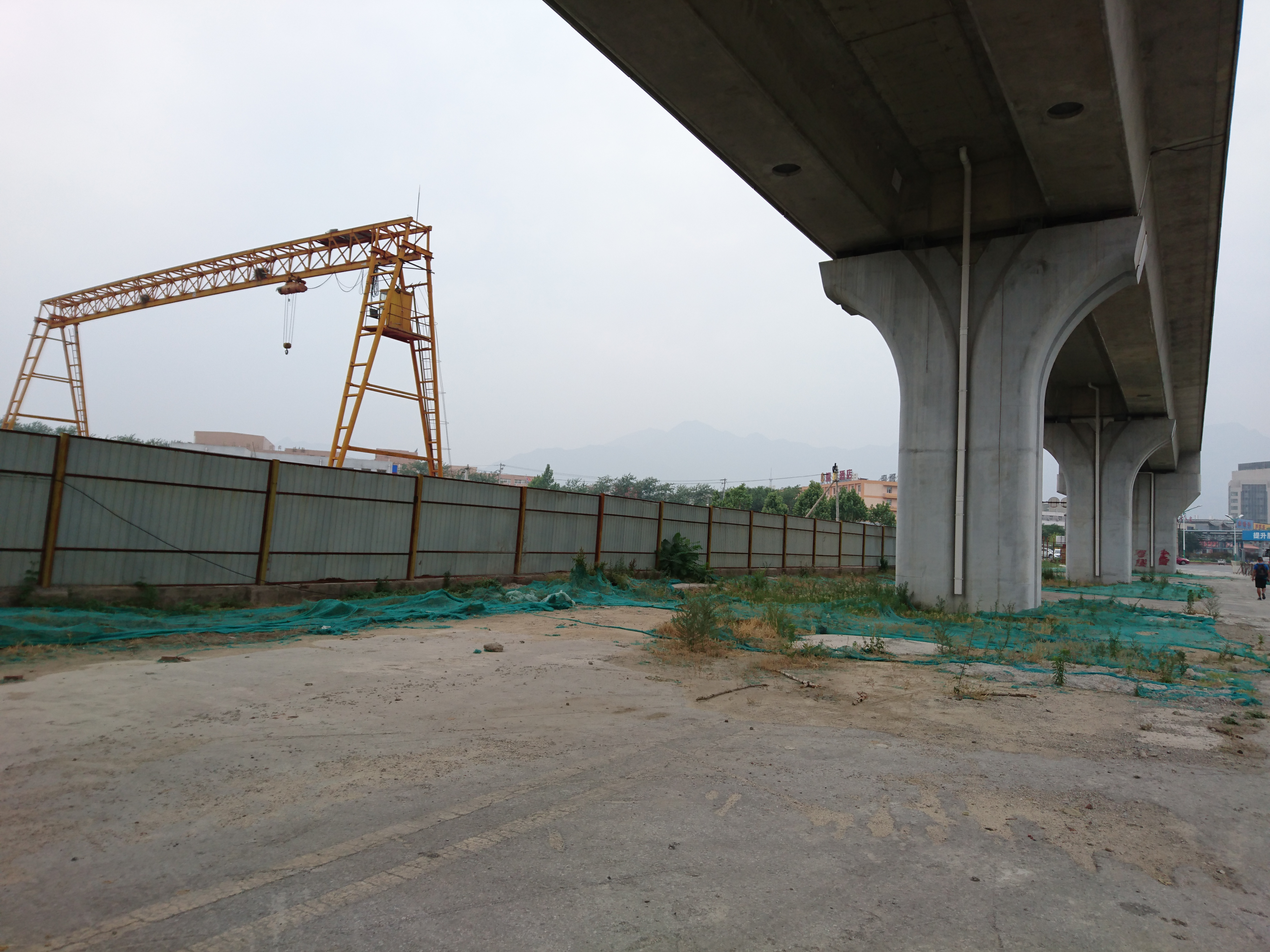 建設中の燕化駅付近(2017年6月)